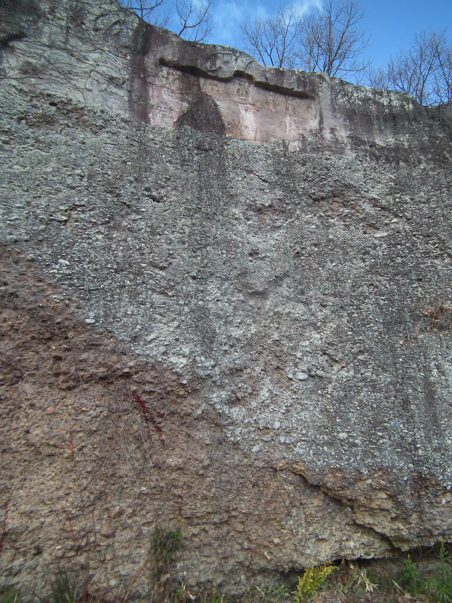 Kidu-Magaibutsu 木津磨崖仏 神戸市西区押部谷町木津